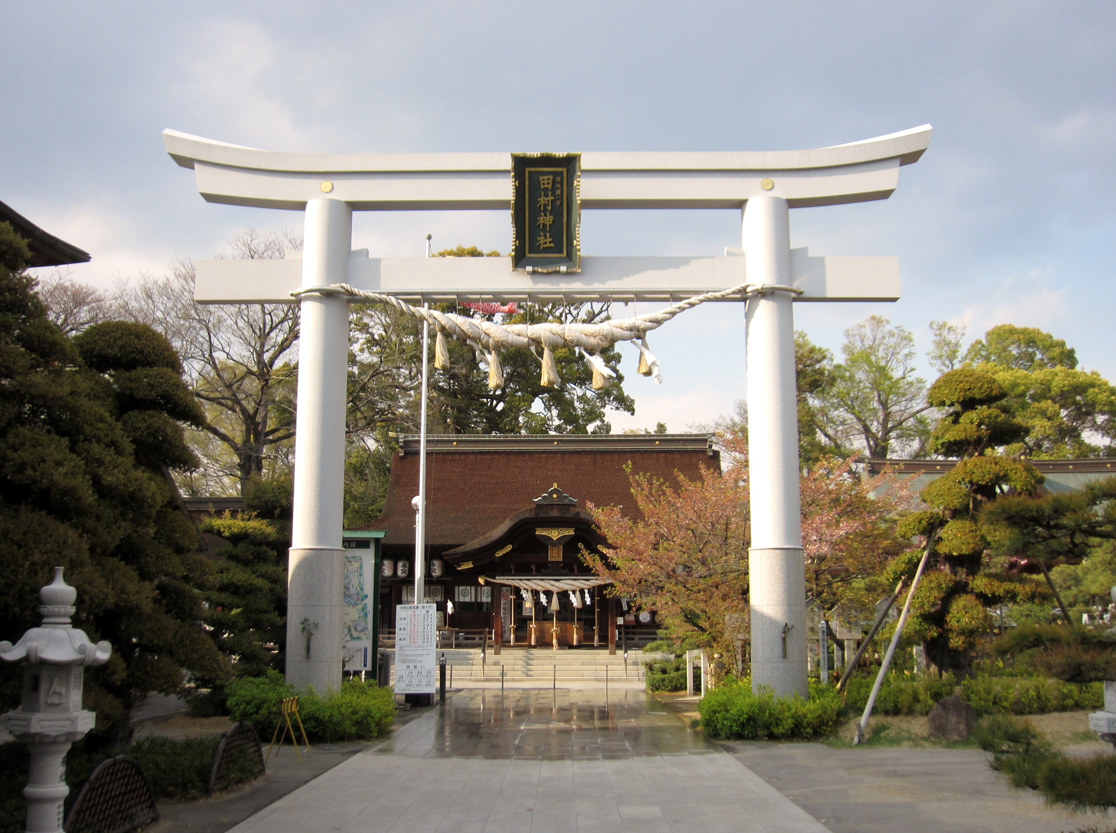 田村神社 (高松市) 正面